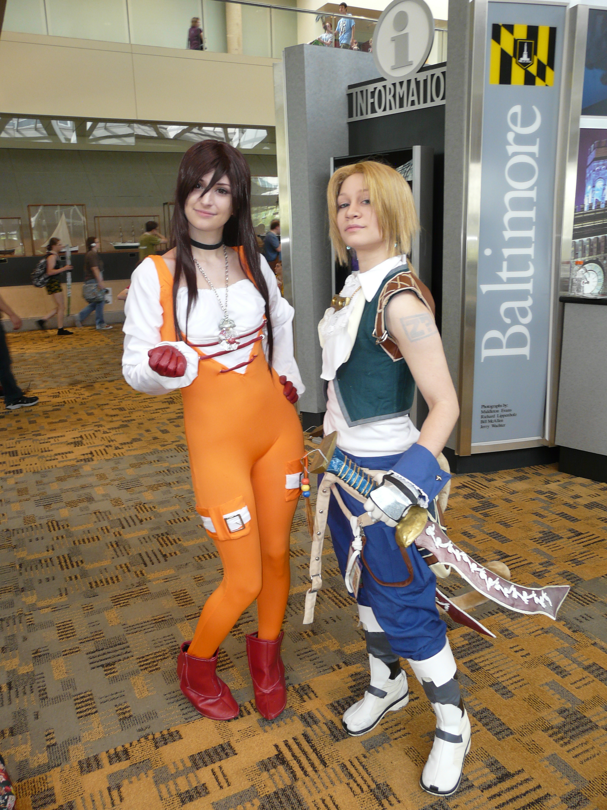 Otakon 2012 cosplay